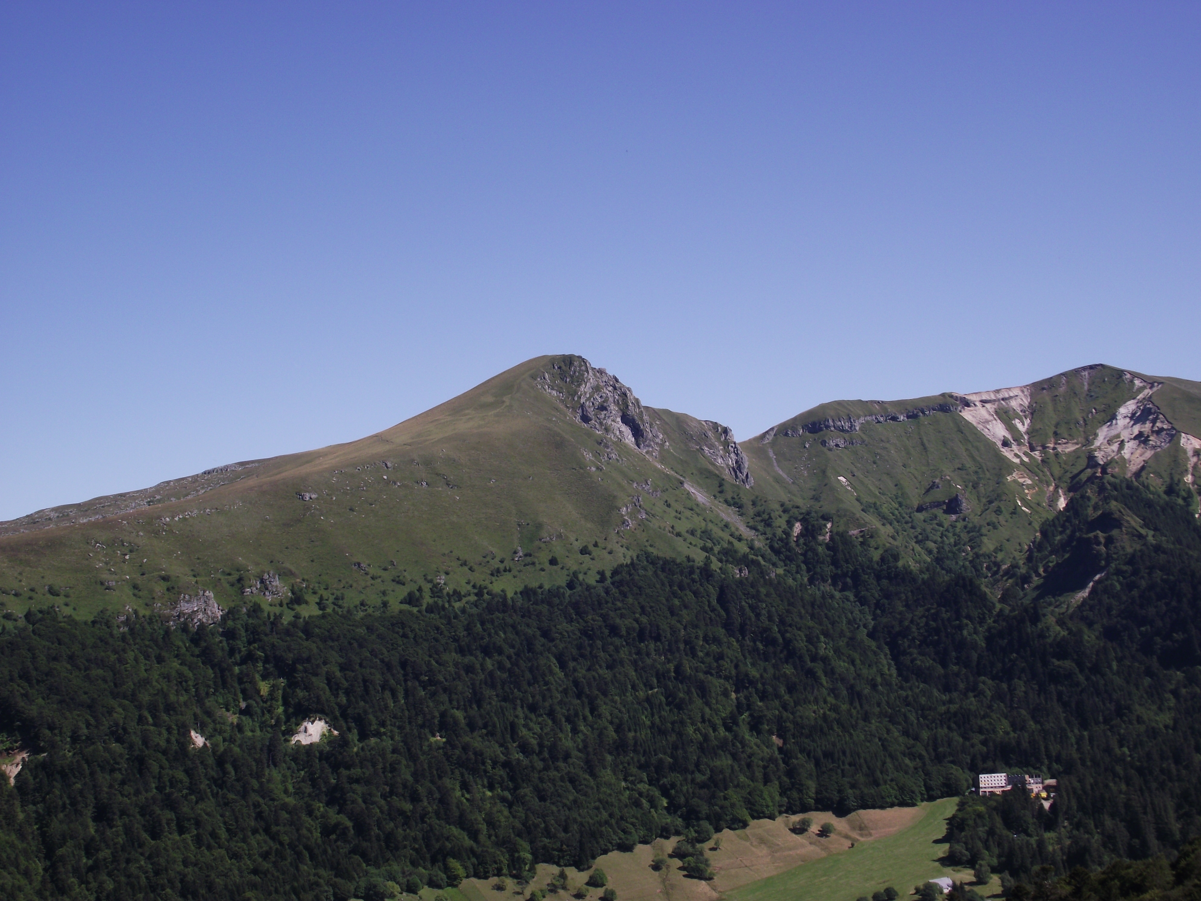 Le roc de Cuzeau (1 737 m) dans les monts Dore vu depuis le Capucin (1 463 m).